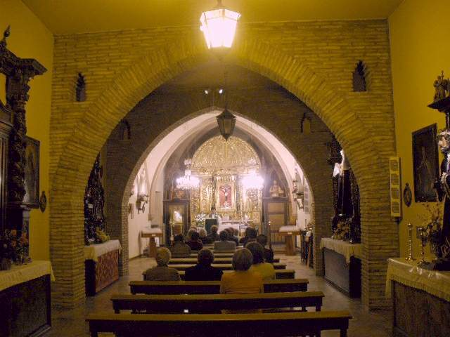 Iglesia del Santo Cristo de Santiago (Cariñena, Zaragoza)